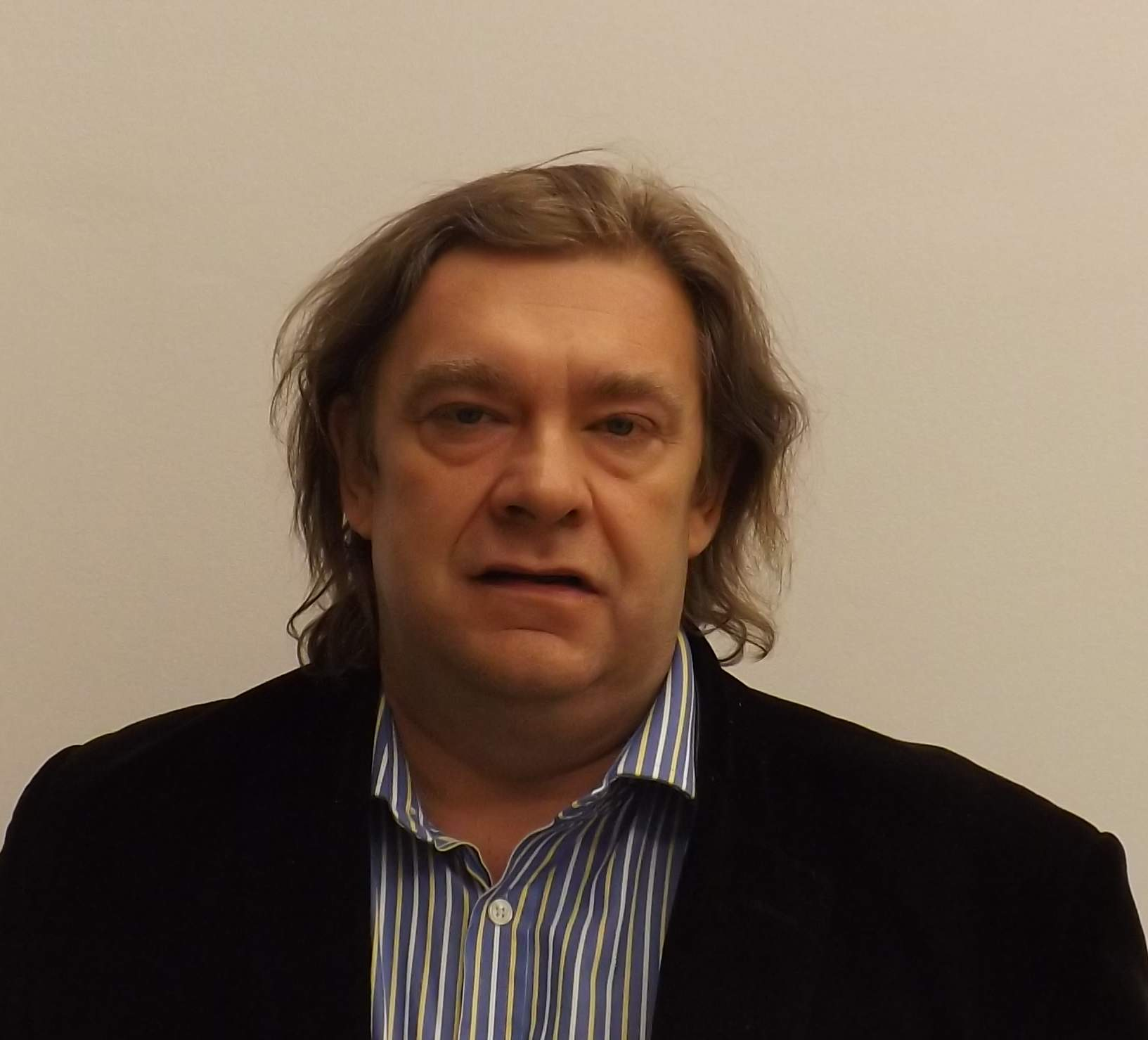 Marek Stolarski, poseł Twojego Ruchu